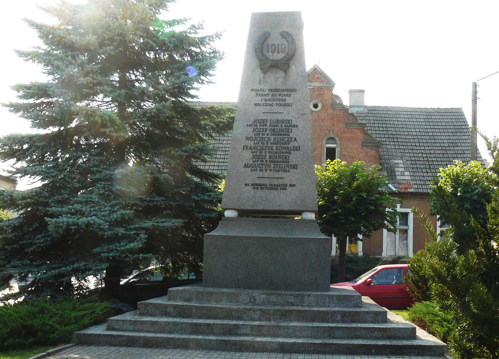 Wysoka.